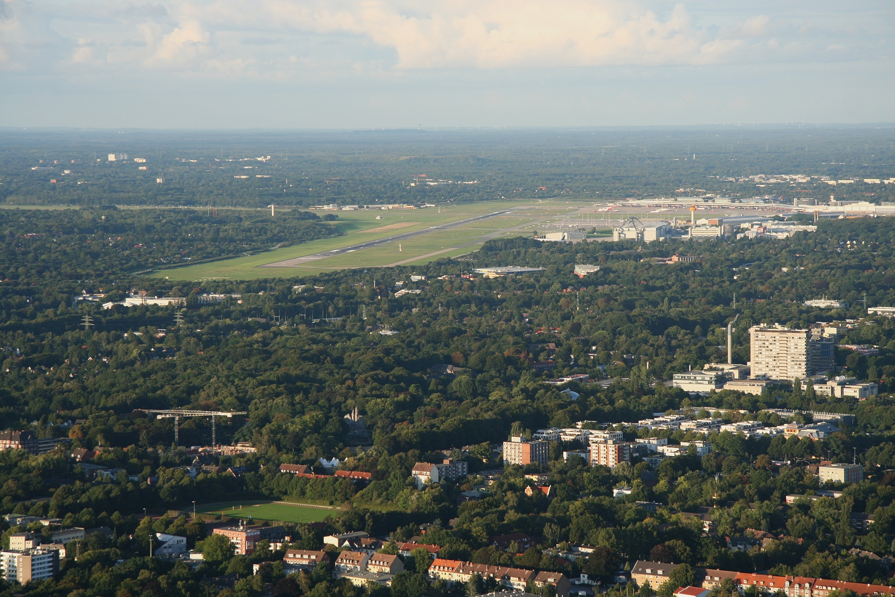 Blick über Lokstedt auf den Flughafen Hamburg